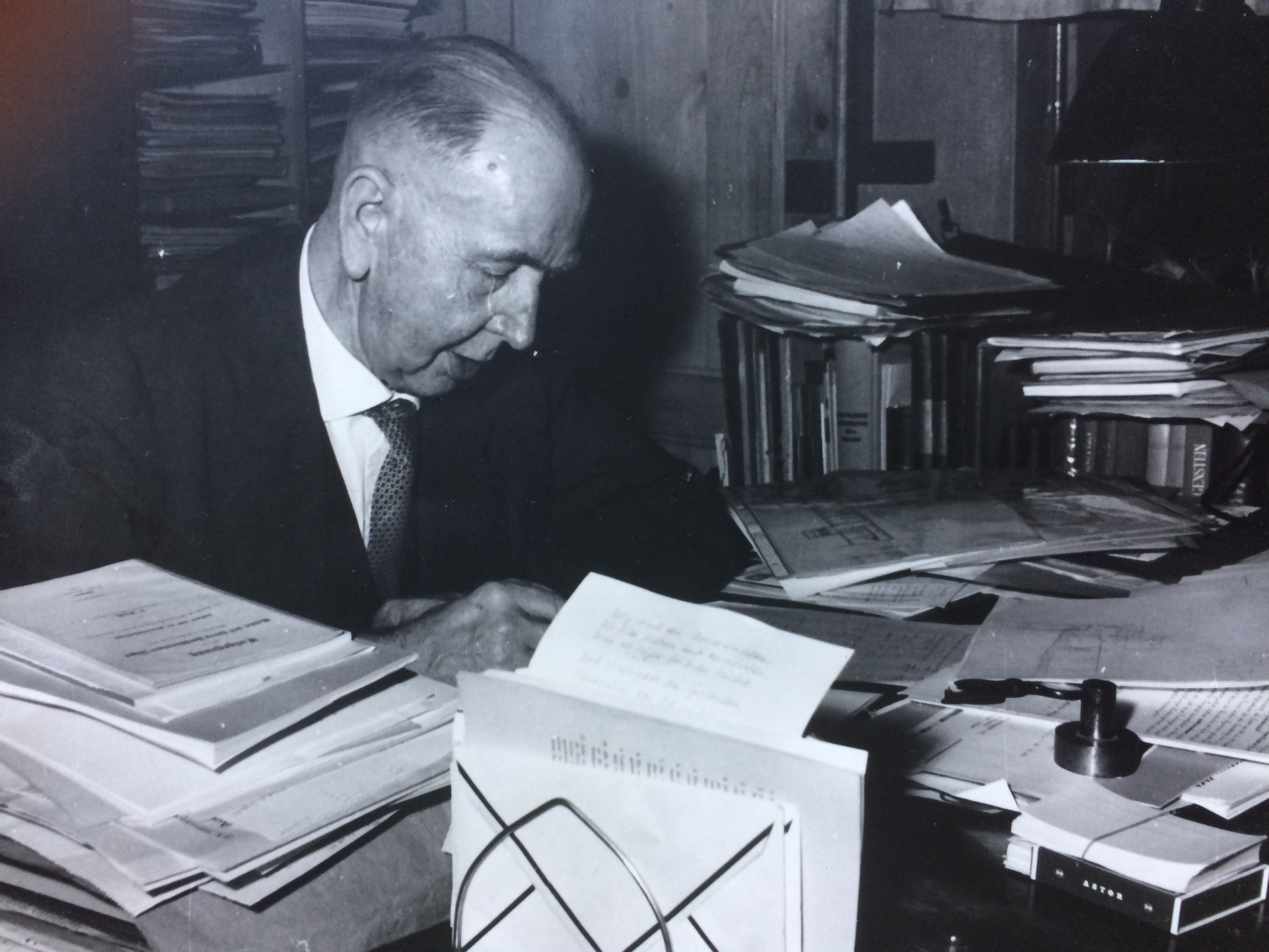 Hier sieht man Prof. Wilhelm Hartnack an seinem Arbeitsplatz in Laasphe